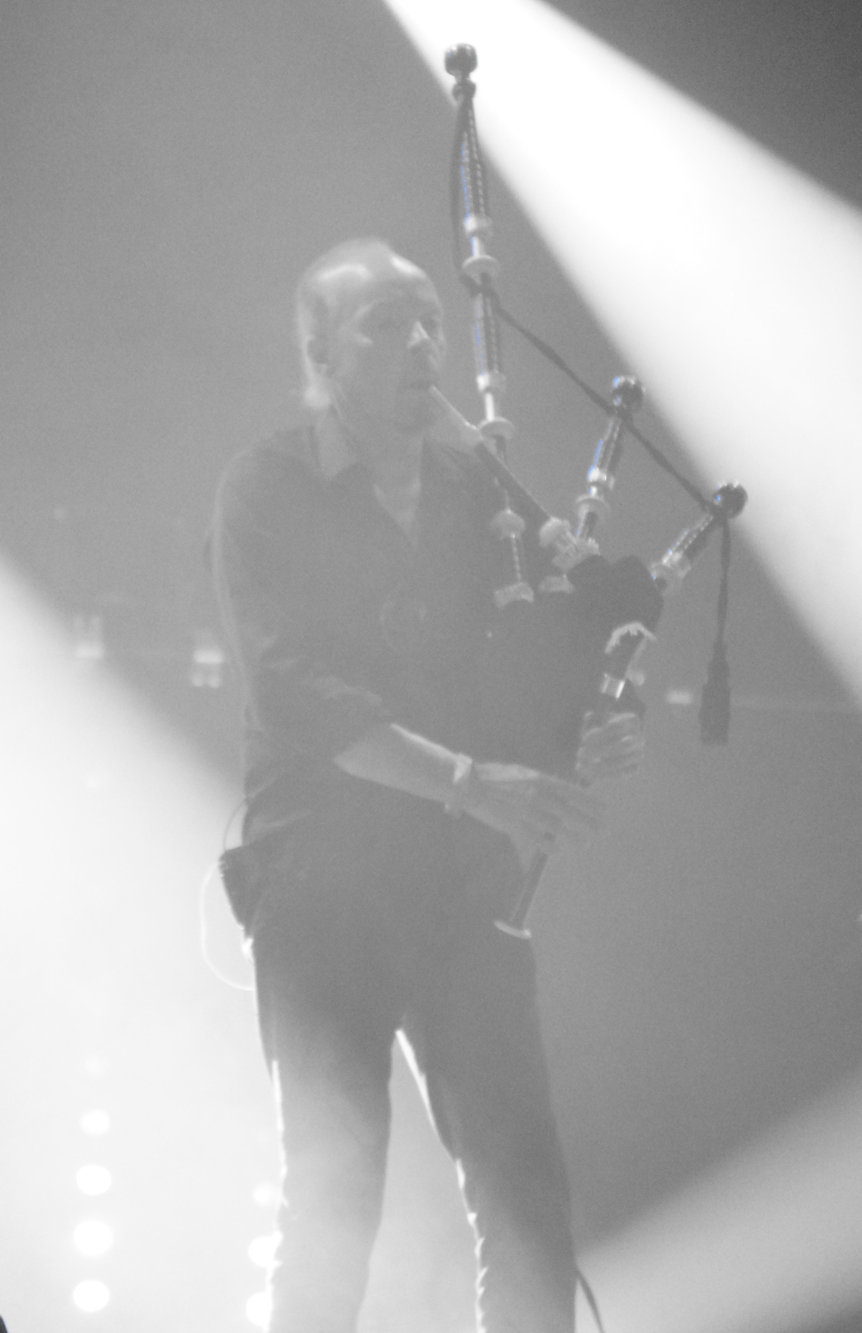 lors ud concert à la foire de chalons.